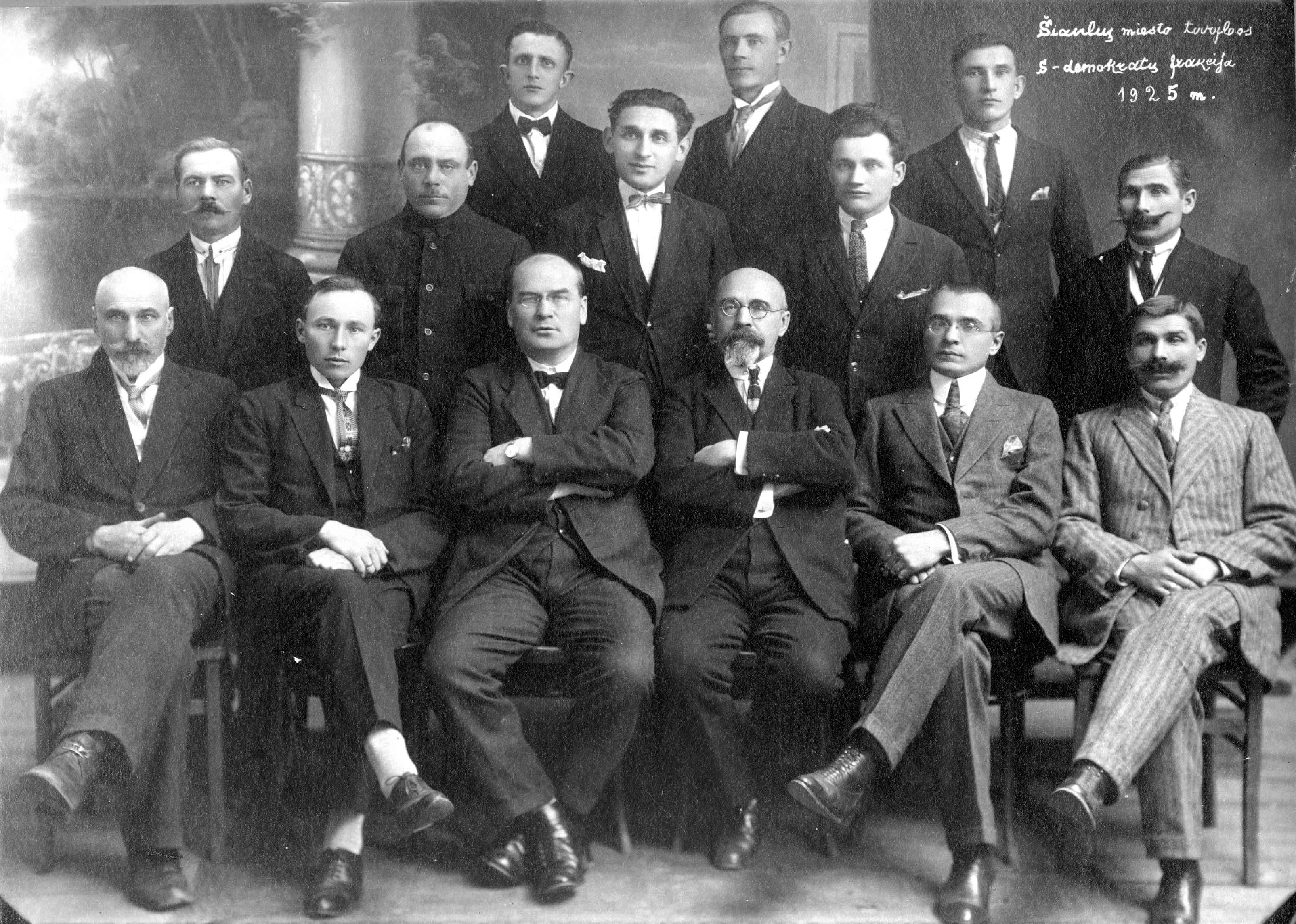 Aušros muziejaus archyvas